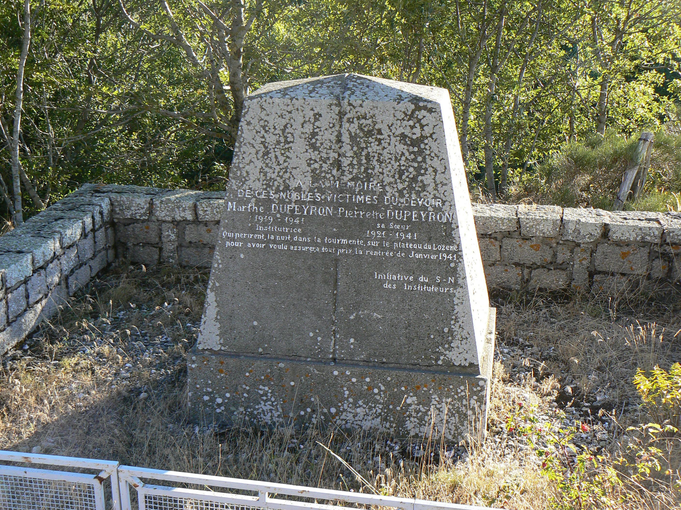 Stèle à la mémoire des sœurs Dupeyron au hameau de La Vaissière, commune des Bondons, Lozère, France